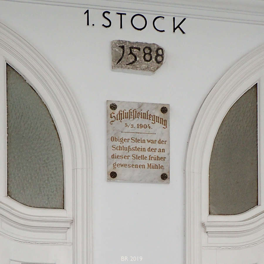 Der Stein vom Torbogen der Färbermühle, die vor dem Bezirksamt Liesing an seiner Stelle stand.